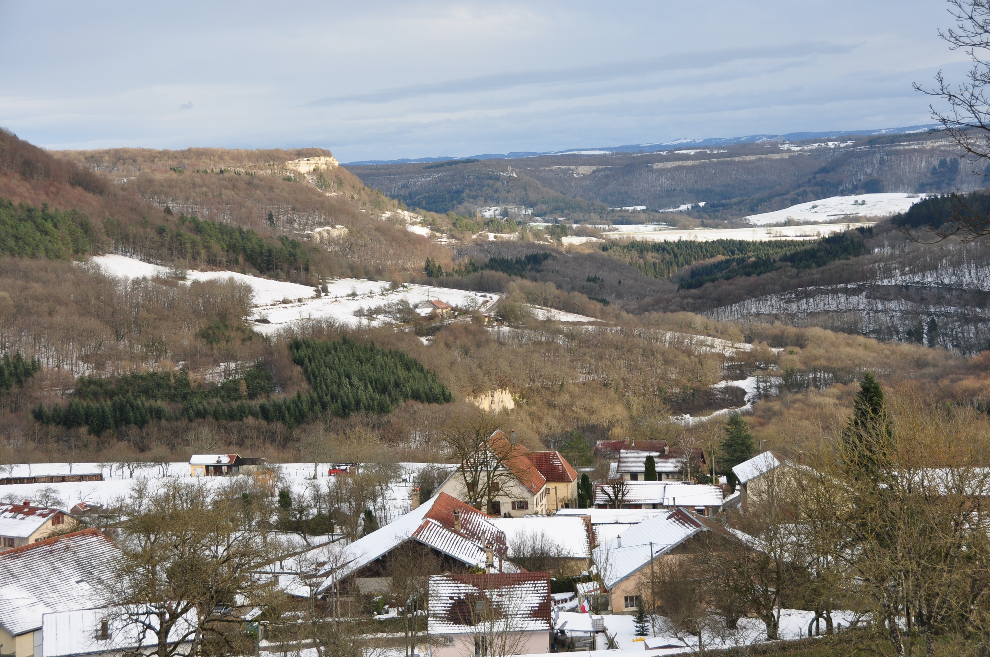 Vue de Cademène avec le Castel St Denis en fond